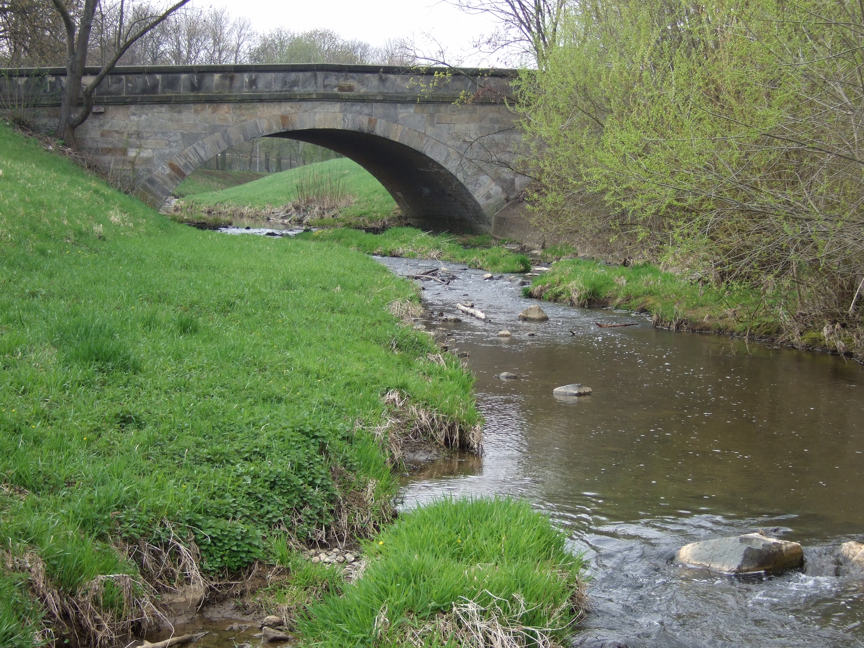 Der Mistel in Bayreuth, Brücke Carl-Burger-Strasse.